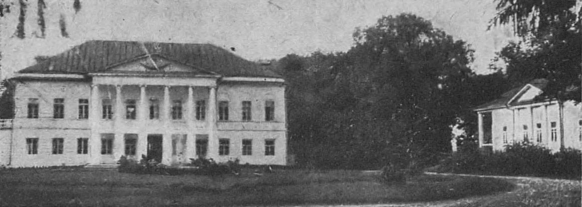 Беларуская (тарашкевіца): Хальч (Chalč), сядзіба Халецкіх (Chalecki)